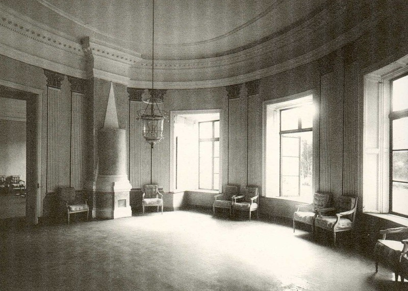 Saltykov Hall in Snegirevo